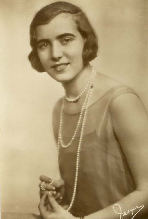 Dronning Ingrid av Danmark